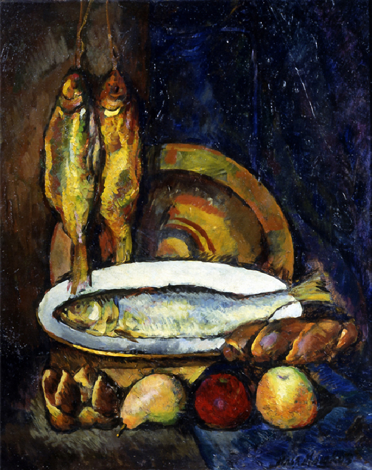 Машков И. И., Натюрморт с рыбами. 1916г. Нижегородский государственный художественный музей, Нижний Новгород.